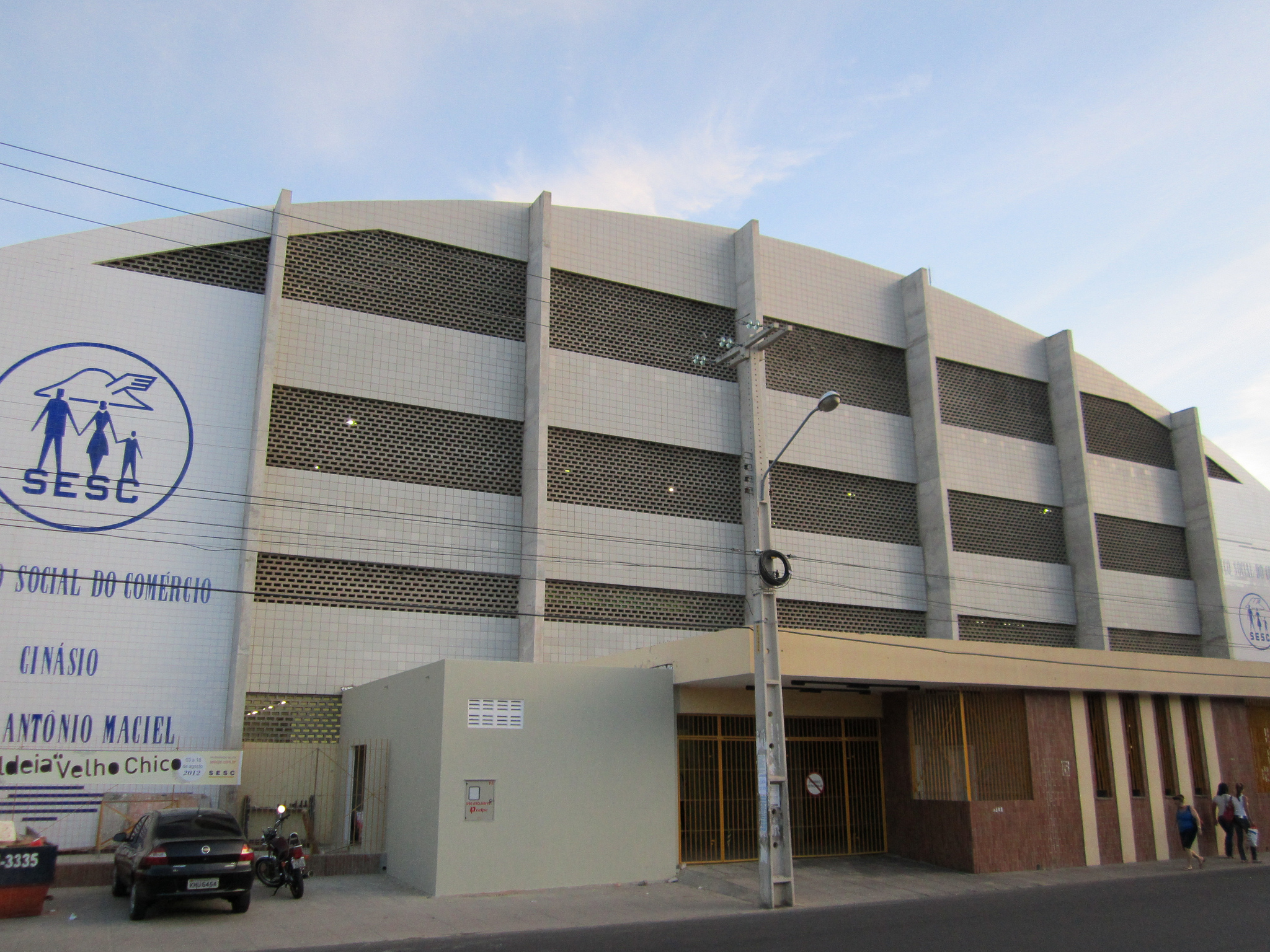 Ginásio do SESC - Petrolina, Pernambuco, Brasil